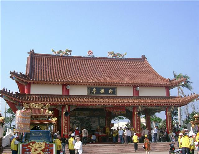 白礁亭是學甲慈濟宮舉行上白礁謁祖祭典的場所，原是為紀念鄭成功與保生大帝的護佑而建。